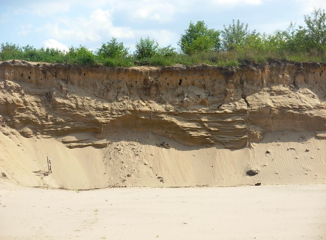 Puszcza Bydgoska - piaszczyste warstwy podłoża